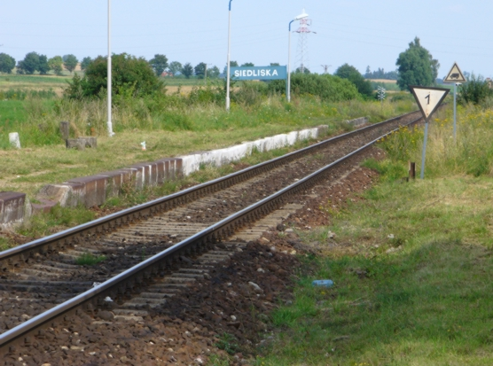 Stacja w Siedliskach